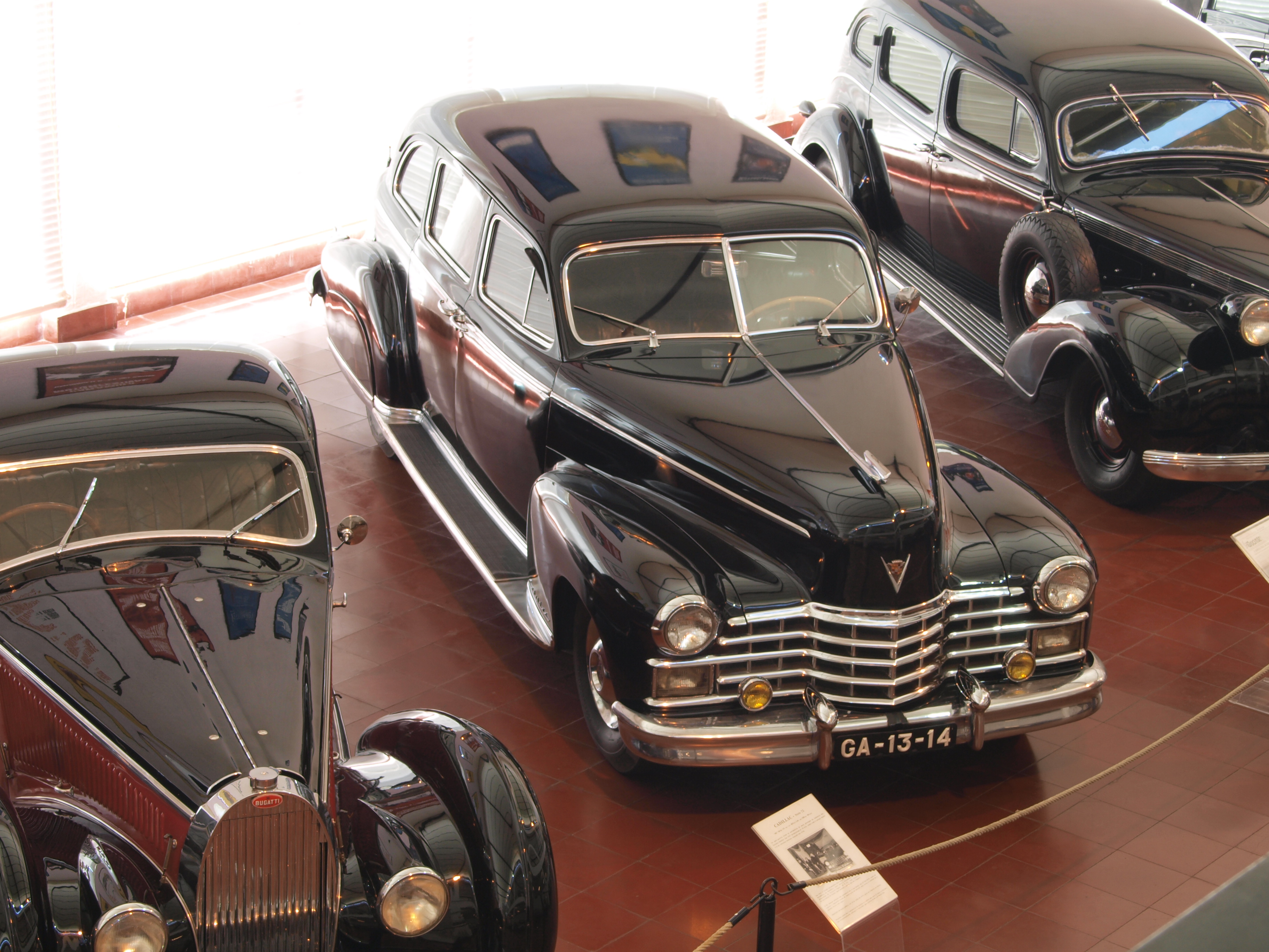 Photographed at the Caramulo museum, 'Museu do Caramulo', Caramulo, Portugal. OLYMPUS DIGITAL CAMERA